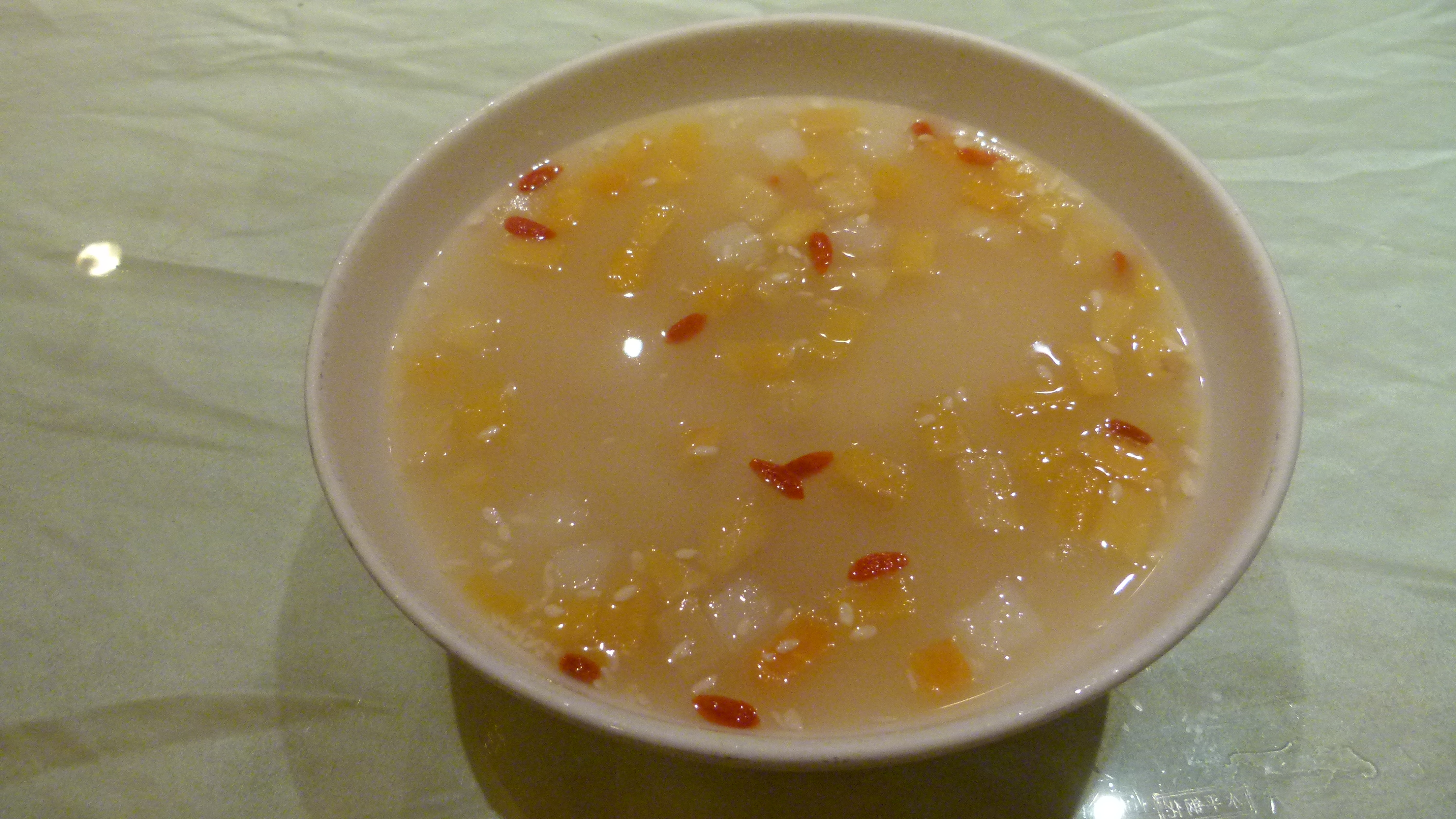 Chinesische Früchtesuppe mit Reis, Lanzhou, Provinz Gansu